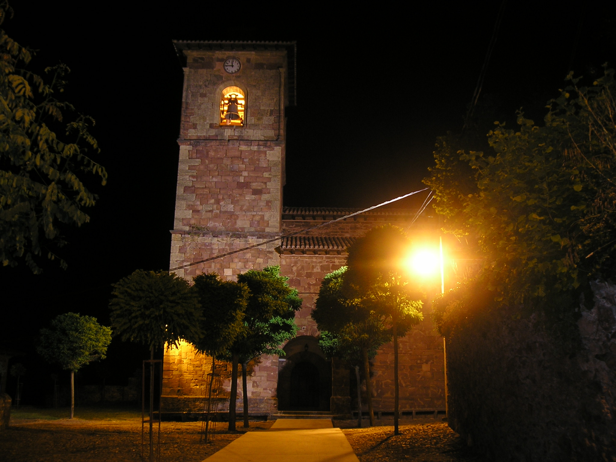 Fachada principal de la Iglesia de Nuestra Señora de la Asunción de Viniegra de Abajo.